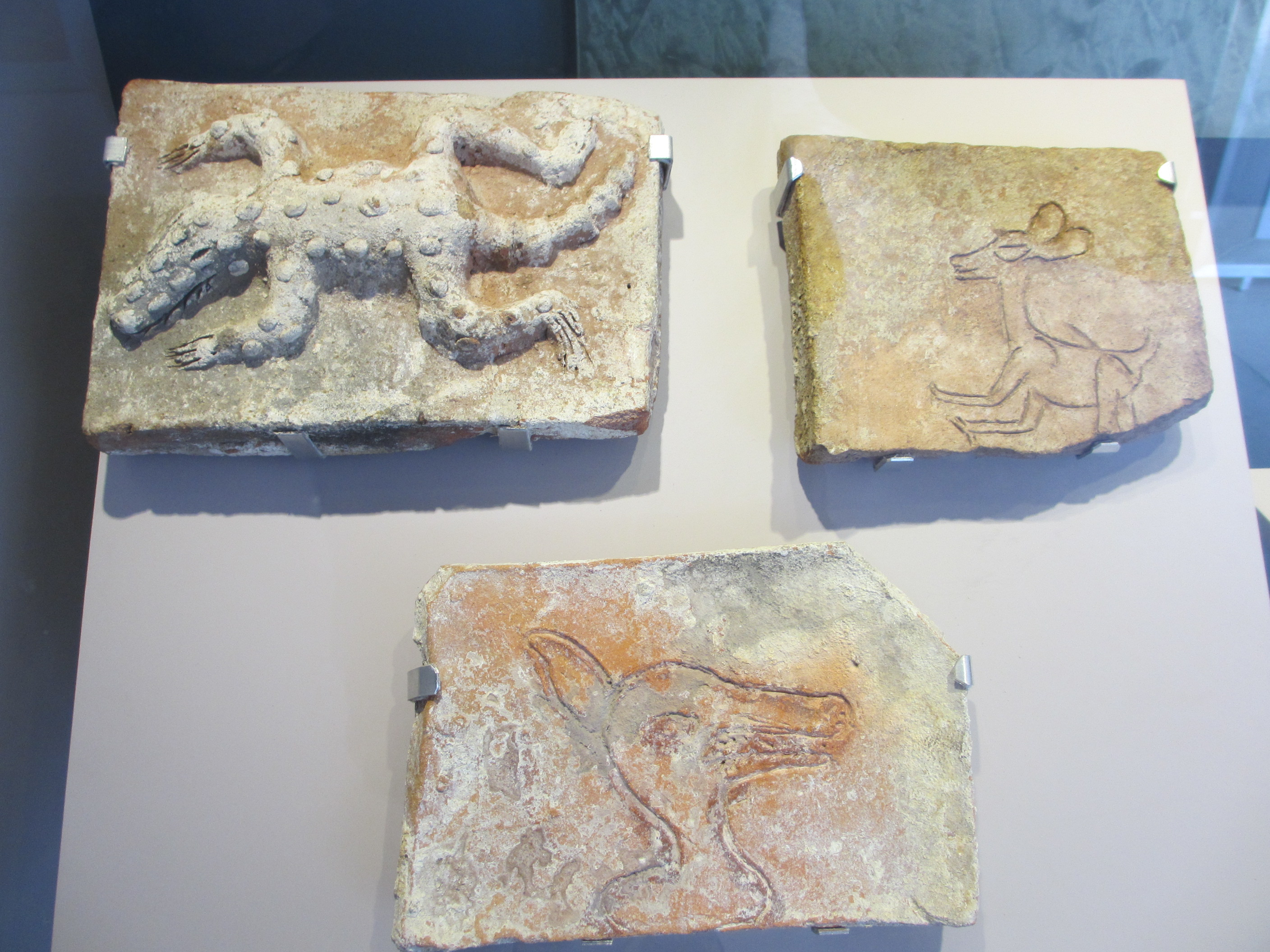 Ladrillos grabados con figuras de animales. Zona arqueológica de Comalcalco. Tabasco México.